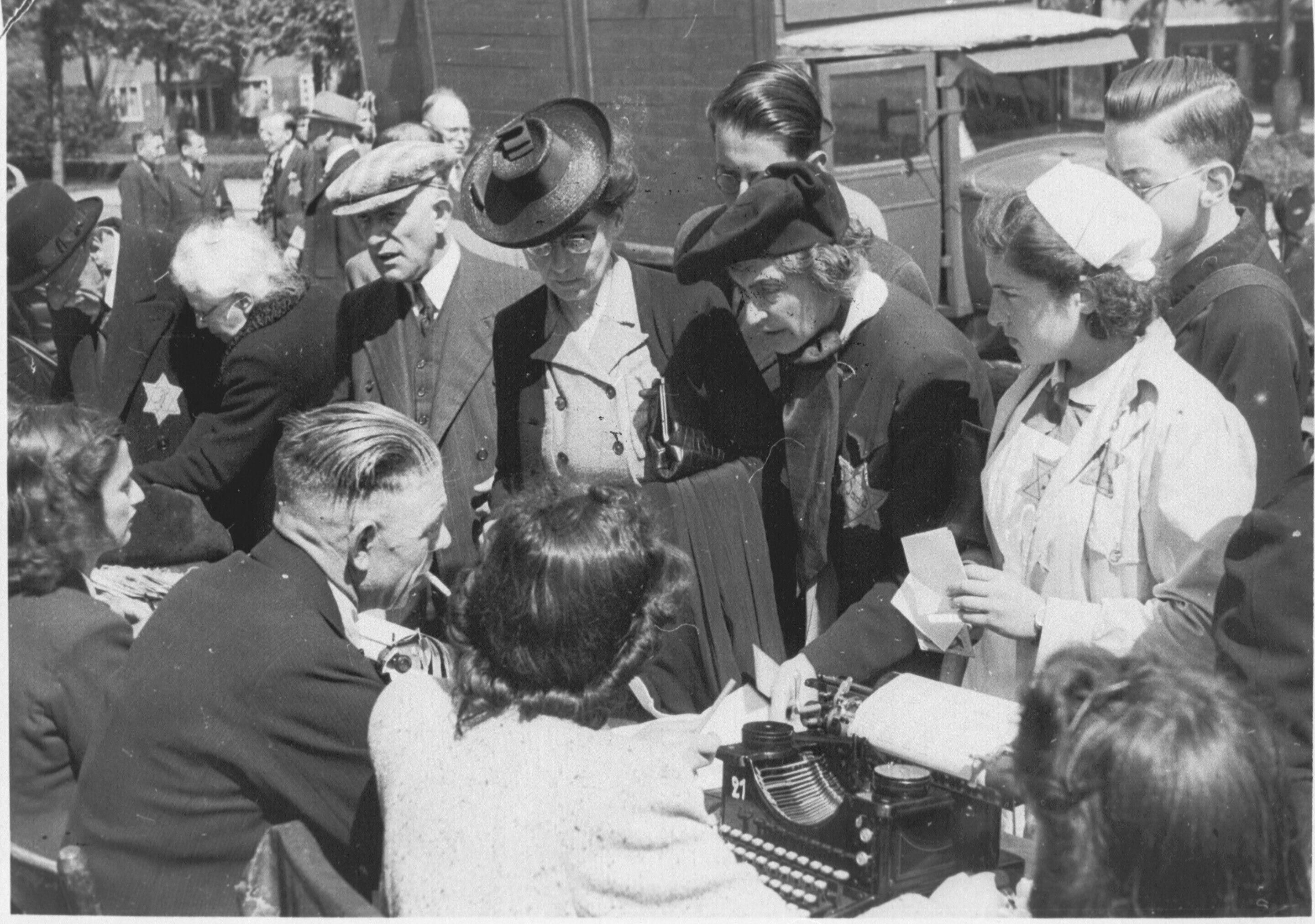 Medewerkers van de kampadministratie van kamp Westerbork schrijven op het Olympiaplein in Amsterdam (op de sportvelden) honderden joden in, die daarna naar kamp Westerbork worden overgebracht. 20 juni 1943.